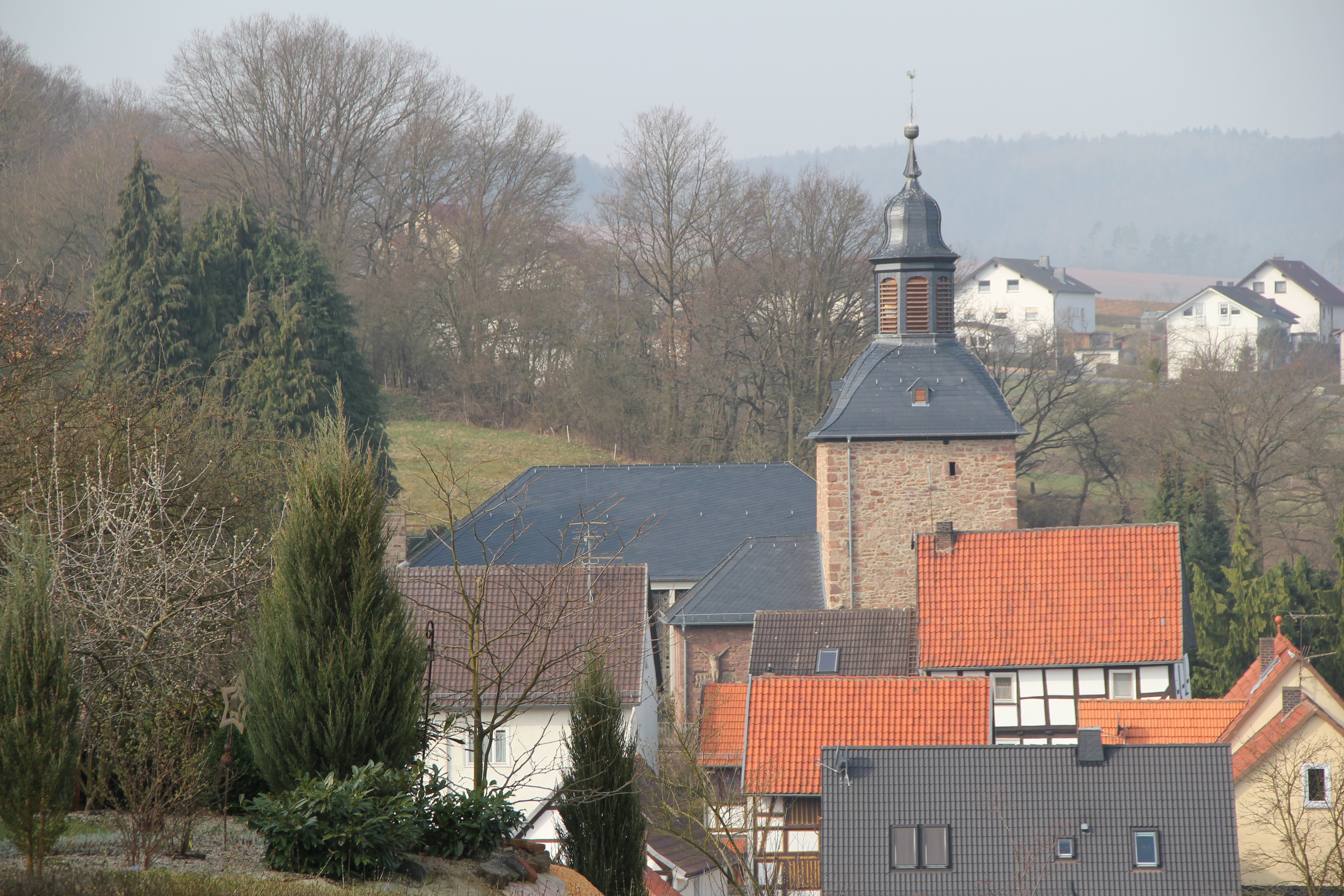 Blick auf Dorf und Kirche St. Bonifatius Ungedanken